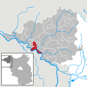 Wittenberge in Brandenburg (Country) - District Prignitz